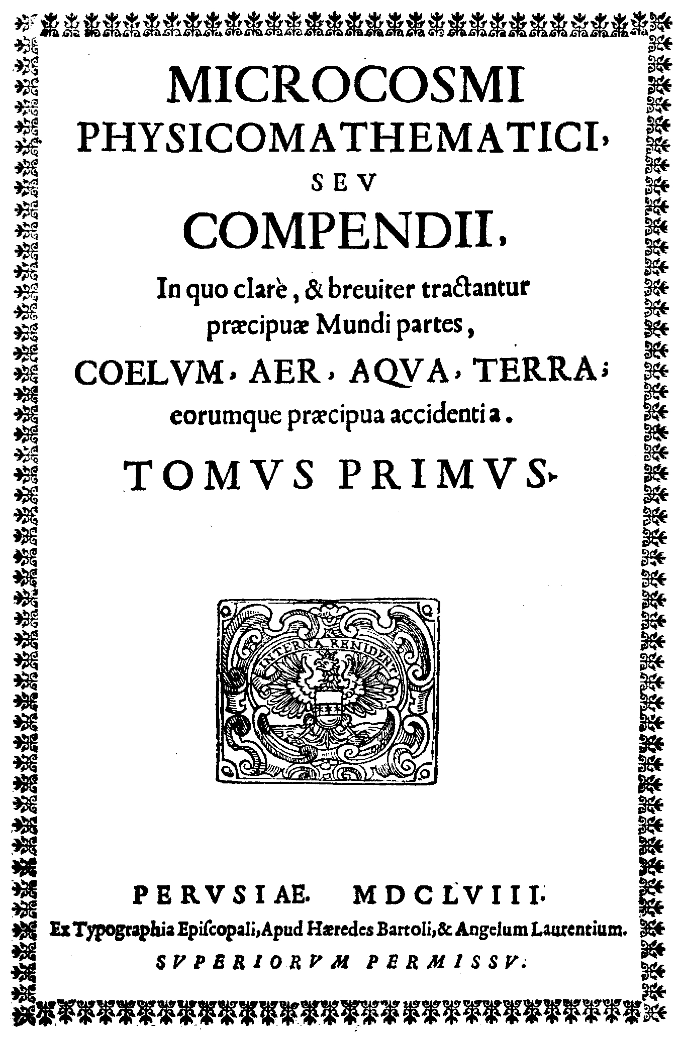 Microcosmi physicomathematici, seu Compendij, in quo clare, & breuiter tractantur praecipuae mundi partes, coelum, aer, aqua, terra, eorumque praecipua accidentia. Tomus primus. - Perusiae : ex typographia episcopali, apud haeredes Bartoli, & Angelum Laurentium, 1658. - [8], 160, 10, [2] p. : ill. ; 2°. - L'A. è Francesco Eschinardi, cfr. BL Italian 17th century vol. I, p. 320 relativamente all'ed. del 1689. - Non sembra siano mai stati pubblicati altri tomi .